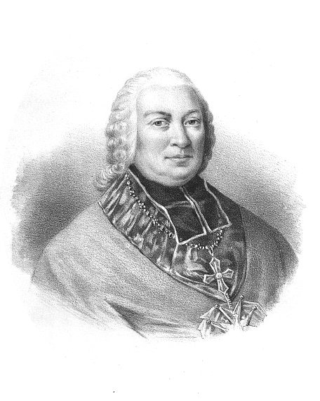 Antoni Kazmierz Ostrowski Primate of Poland